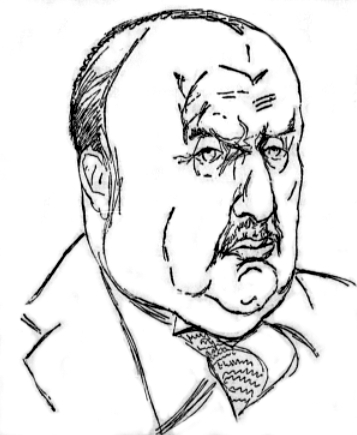 Eugen Landau, Porträt in der Vossischen Zeitung, 8. 4. 1929; nachbearbeitet